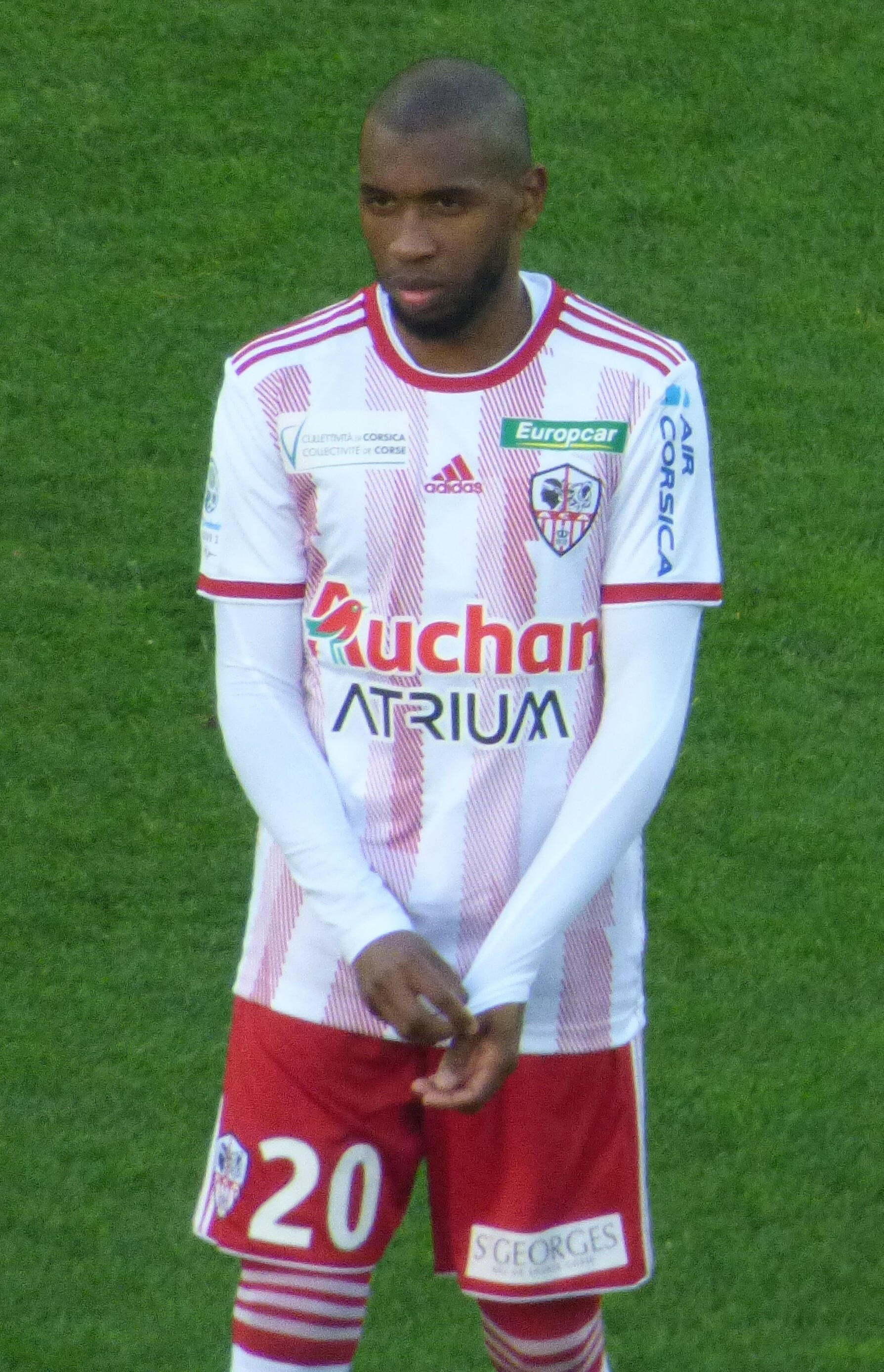 Mohamed Youssouf pendant le match RC Lens - AC Ajaccio, comptant pour la dix-neuvième journée du championnat de France de Ligue 2 2018-2019, le 22 décembre 2018, au Stade Bollaert-Delelis de Lens.